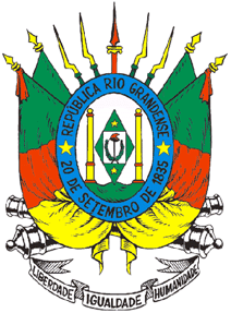 Brasão do Estado Brasileiro do Rio Grande do Sul.